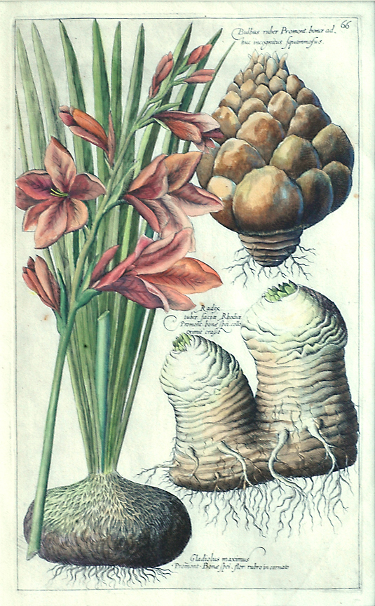 Plate 66 from "Florilegium Amplissimum et Selectissimum"